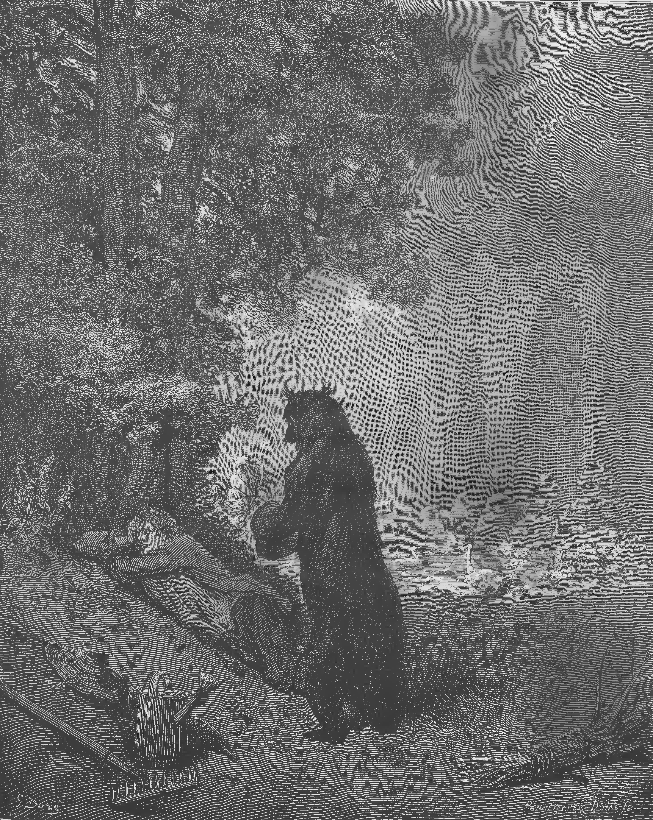 grafika z książki PL publikacja: Nakładem i drukiem Jana Noskowskiego, Warszawa 1876